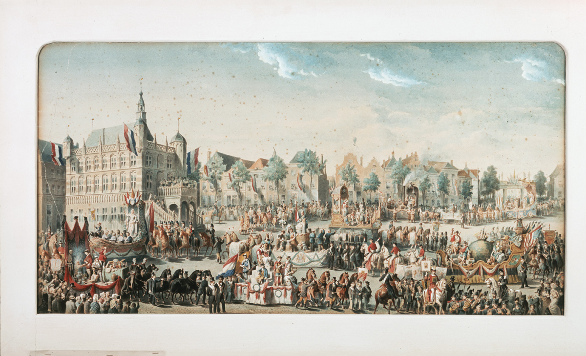 Optocht op de Brink in Deventer: Viering 50 jaar bevrijding (1864) na het Beleg van Deventer (1813-1814), Aquarel door Jan Striening